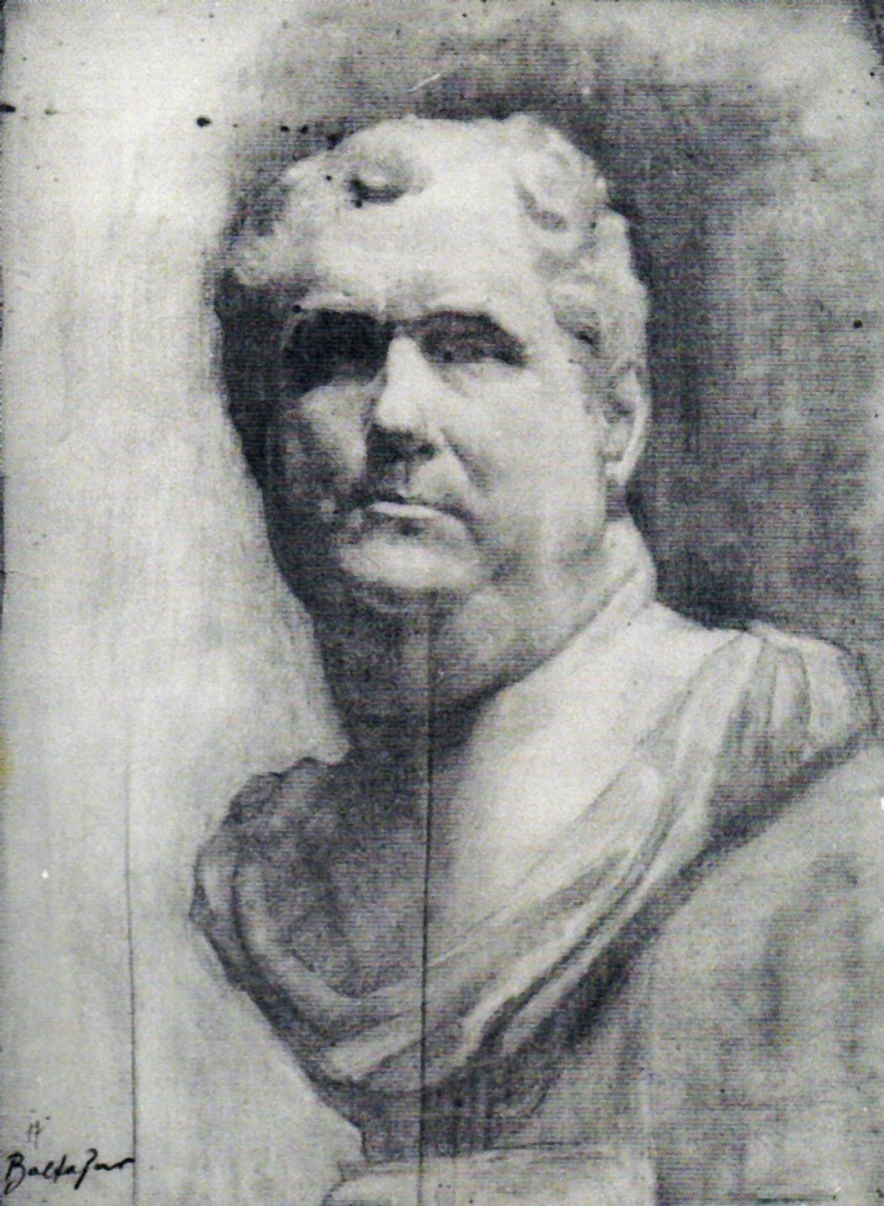 Vitelius